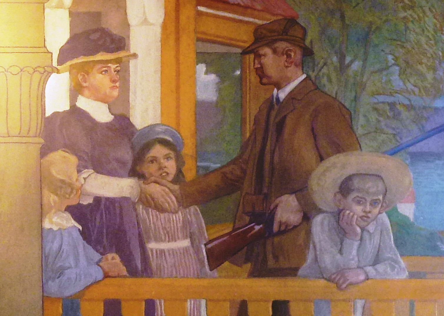 Del av freskomålningen "Åldrar och Årstider" av Georg Pauli (1855-1935) i Villa Paulis salong, Anna och Albert Pauli med sina barn.